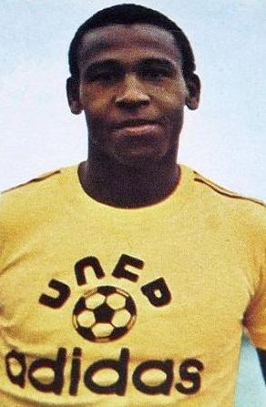 Merry Krimau en 1974, 'Ageducatifs 1974 - 1975', Panini figurina n°174.